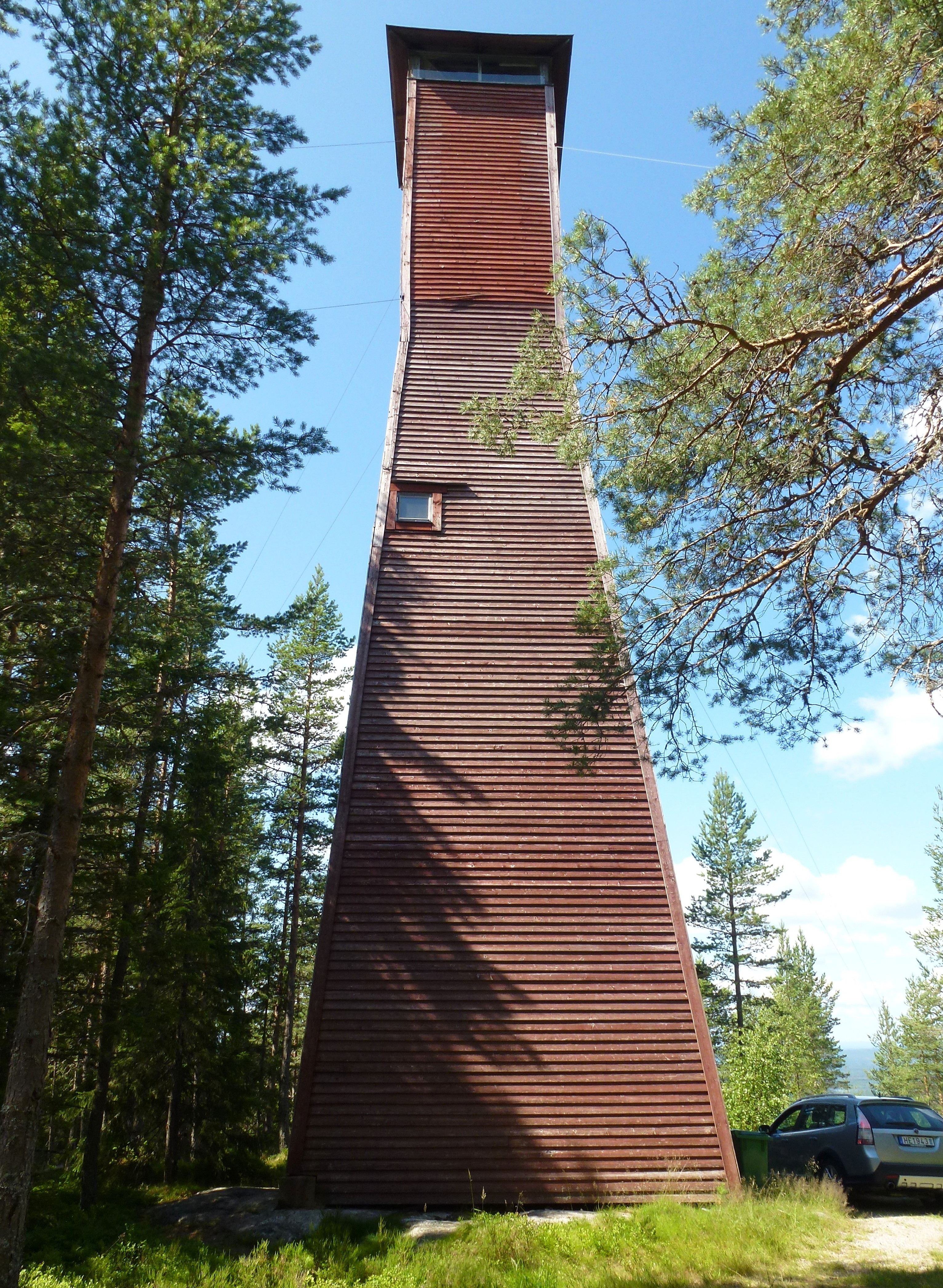 Utsiktstornet Majdåsen